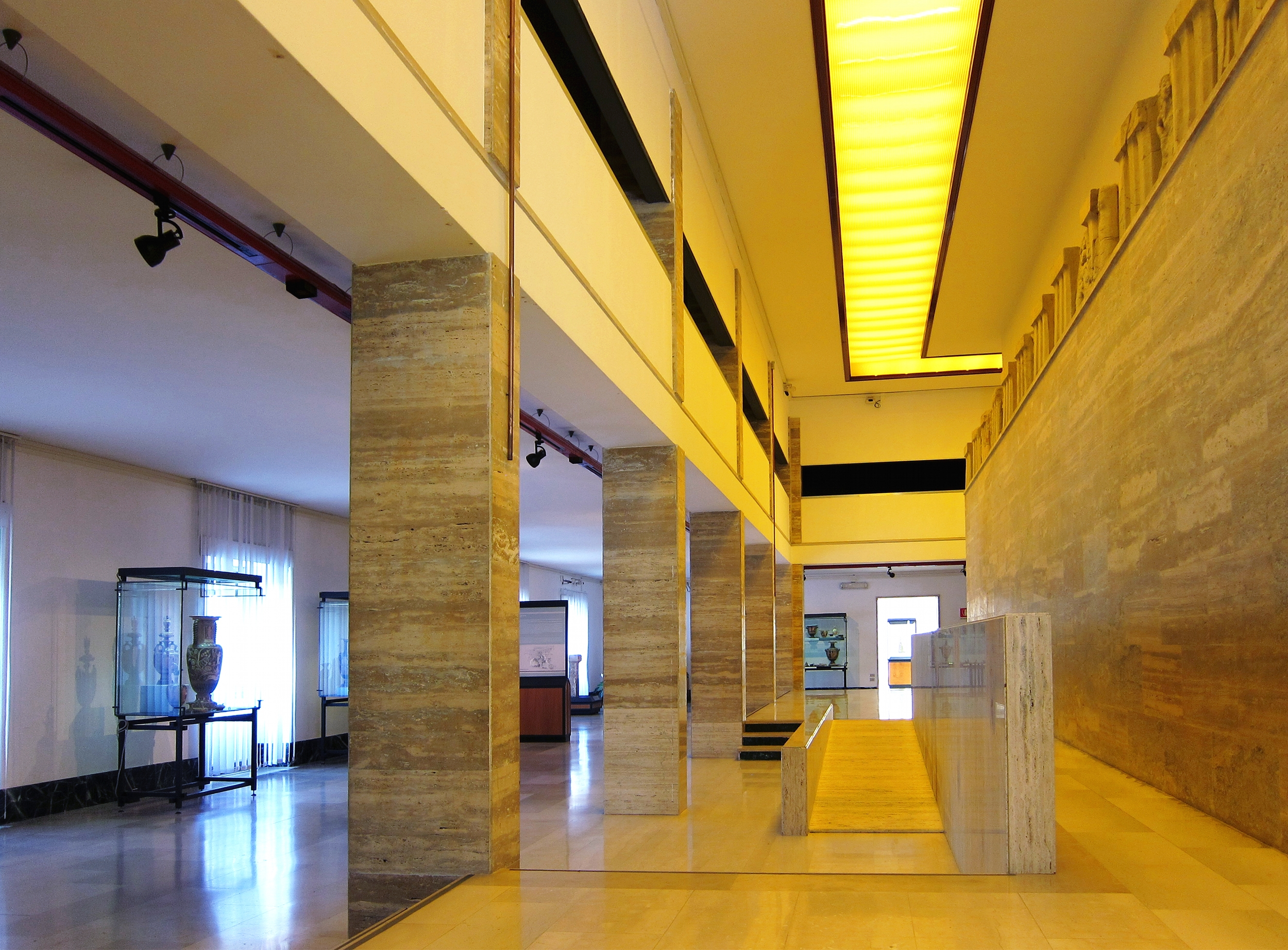 Vue de l'intérieur du Museo archeologico nazionale de Paestum (Italie).